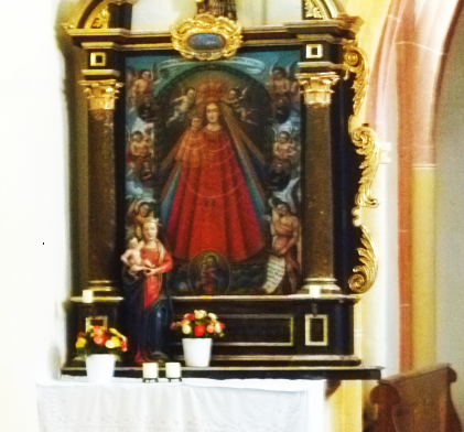 Kath. Filialkirche hl. Georg